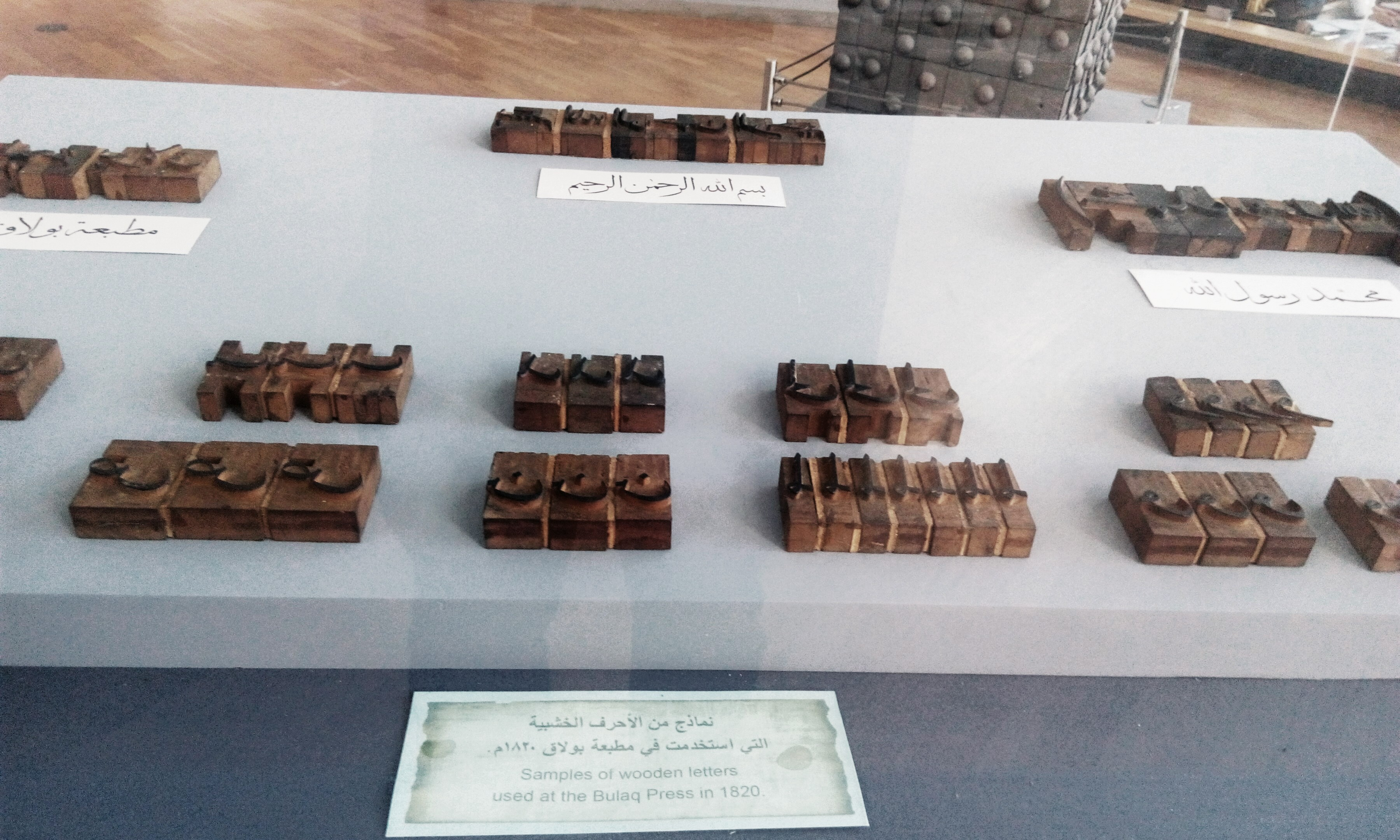 نَماذج من الأحرف الخشبية المُستخدمة للطباعة في مطبعة البُولاق